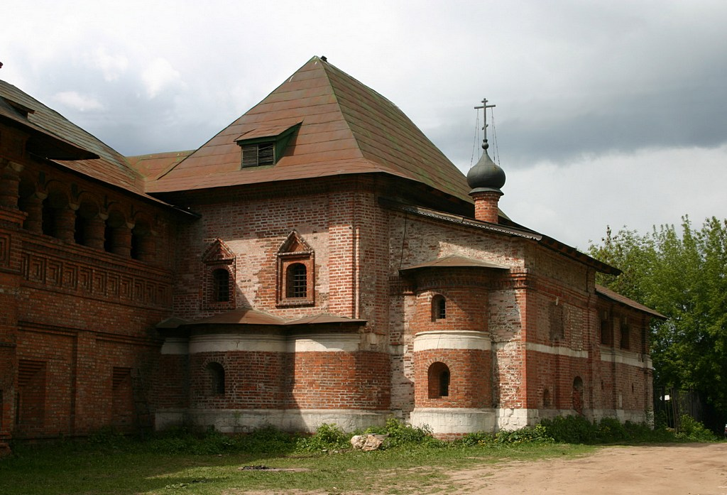 Подворье Крутицкое (Москва и Московская область, Москва, 1-й Крутицкий переулок, 4-а, 4/2, Арбатецкая улица, 2/28,)